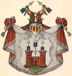 Campenhauseni suguvõsa aadlivapp